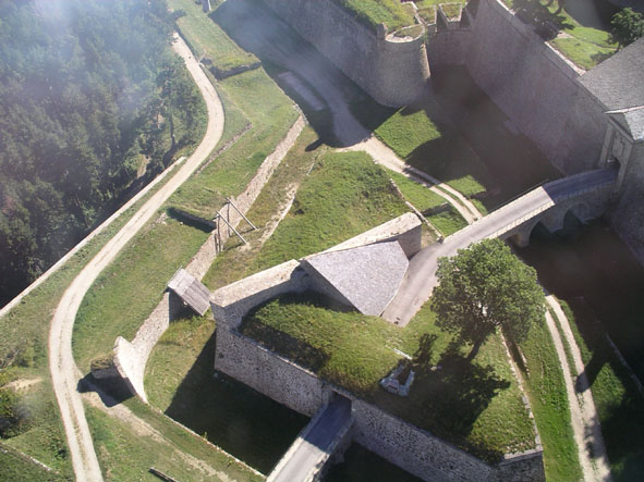 Mont-Louis citadelle Vauban